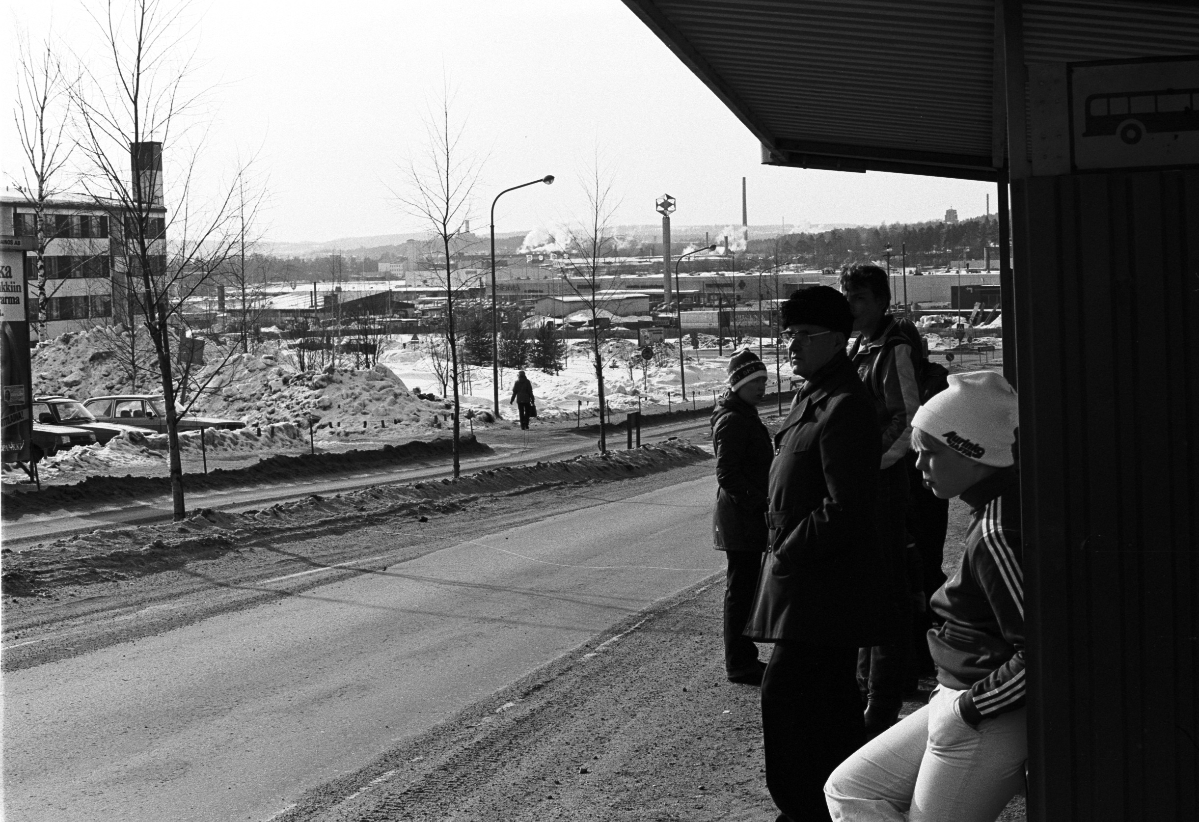 Bussipysäkki Jyväskylän Kangasvuorentiellä keväällä 1982. Takana näkyy Seppälän automarket Prisman mainostorni.